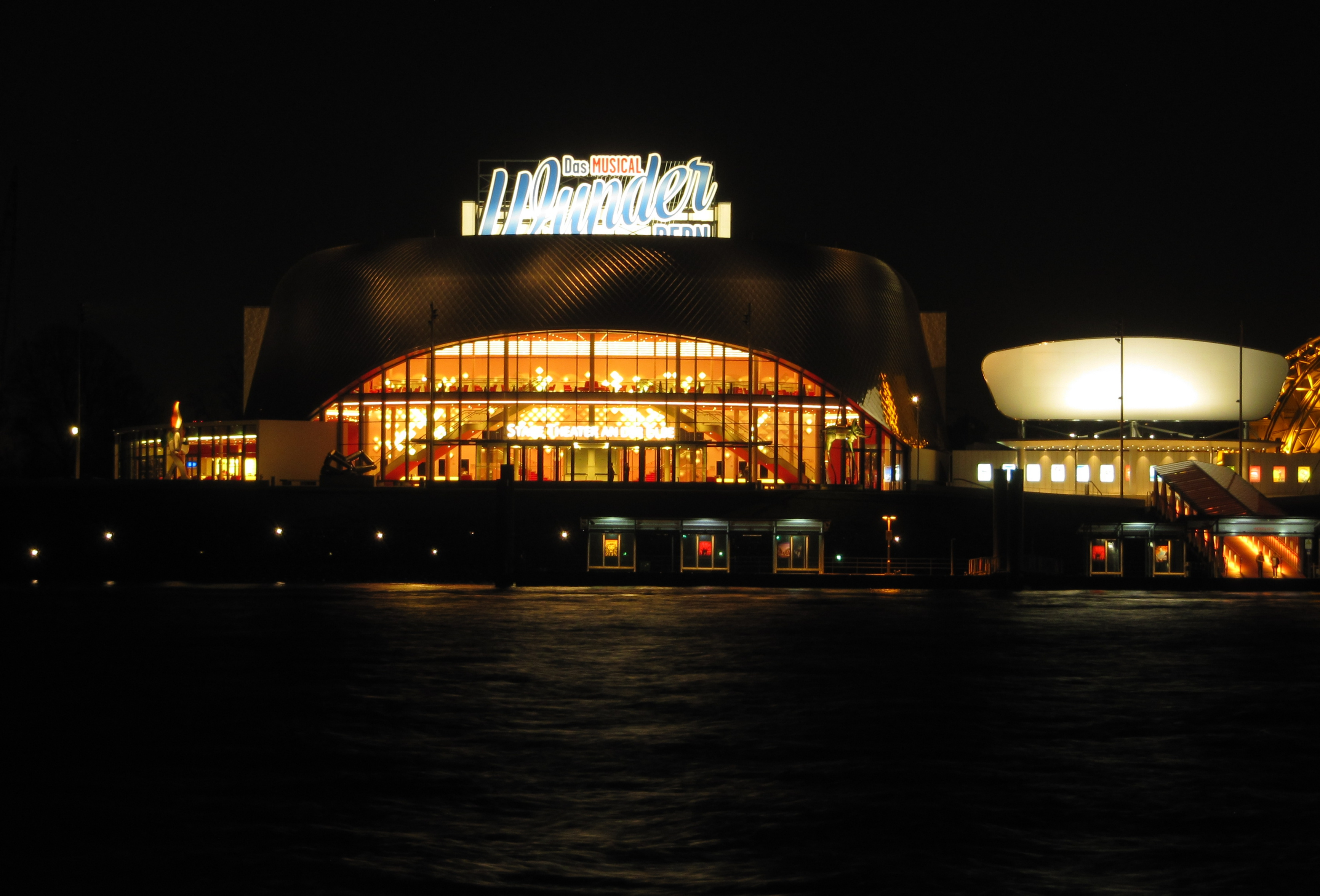 Theater an der Elbe, Hamburg (Musical "Wunder von Bern")